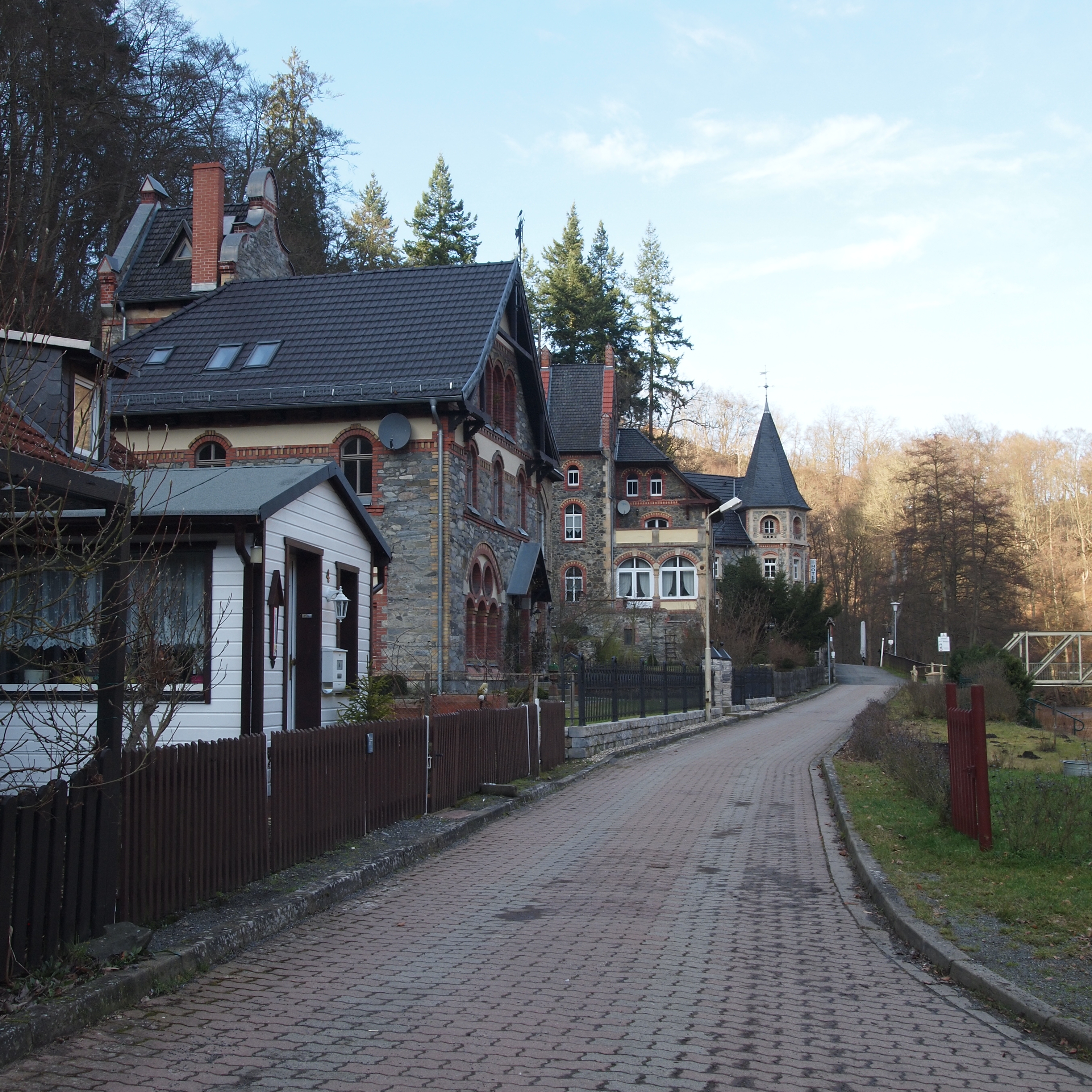 Treseburg (Stadt Thale, Landkreis Harz, Sachsen-Anhalt) An der Halde